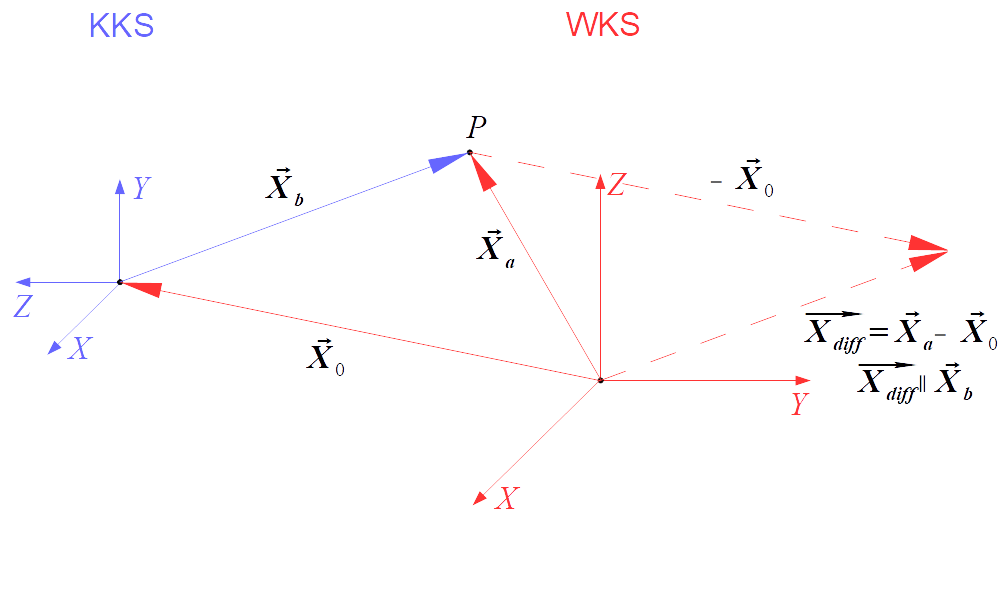 Hier wird die Transformationsbeziehung zwischen zwei gegeneinander verschobenen und beliebig gedrehten Koordinatensystemen dargestellt. Und zwar zwischen einem Weltkoordinatensystem (WKS in rot) und einem Kamerakoordinatensystem (KKS in blau). Es wird besonderes Augenmerk auf die Translation gelegt. Bezüglich des WKS (rote Pfeile) ergibt sich der Punktvektor X_b (blau) nochmals im Parallelogramm als Differenzvektor X_diff.